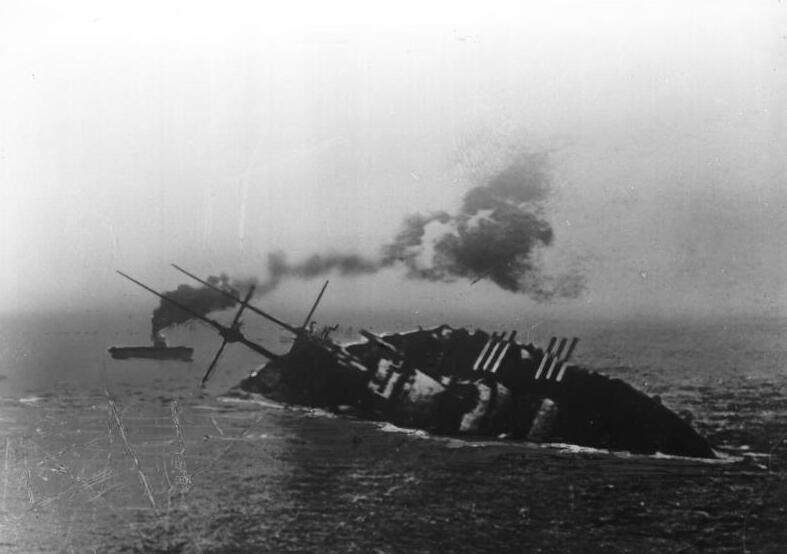 Szent István, Sinkendes Linienschiff Szent István Österreichisch Ungarisches Linienschiff Stapellauf: 17.1.1914 Kenternd am 10. Juni 1918 (Versenkung erfolgte durch ein italienisches Motorboot)